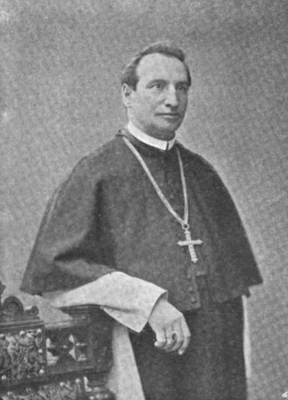 Meinrad Wenzel Siegl (1842 - 1911), Opat cisterciáckého kláštera v Oseku.